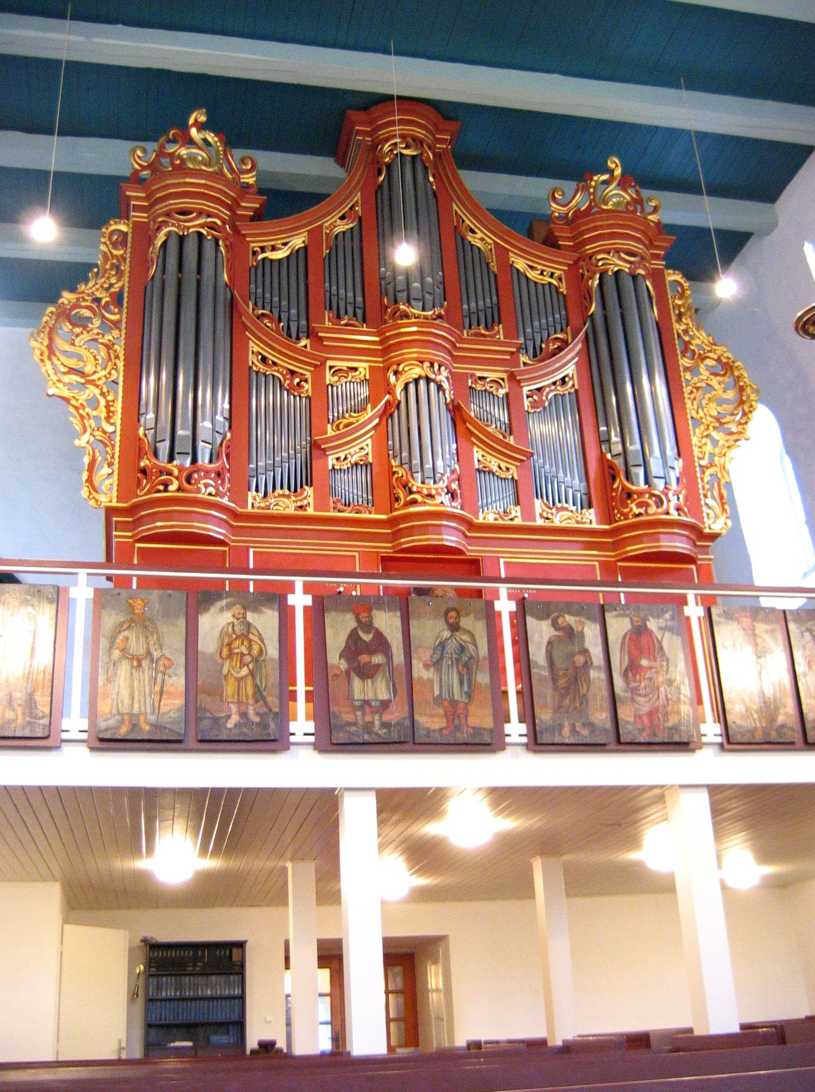 Orgel in Hage, Landkreis Aurich